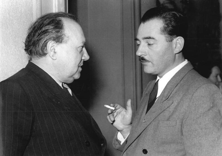 Zentralbild-Gielow 29.2.52. Arbeiterkonferenz der Schriftsteller und Komponisten in Berlin. Am 29.2.52 fand im Haus des Kulturbundes in Berlin eine Arbeiterkonferenz des Deutschen Schriftstellerverbandes und des Verbandes deutscher Komponisten statt. UBz: Prof. Ottmar Gerster im Gespräch mit Guido Masanetz.